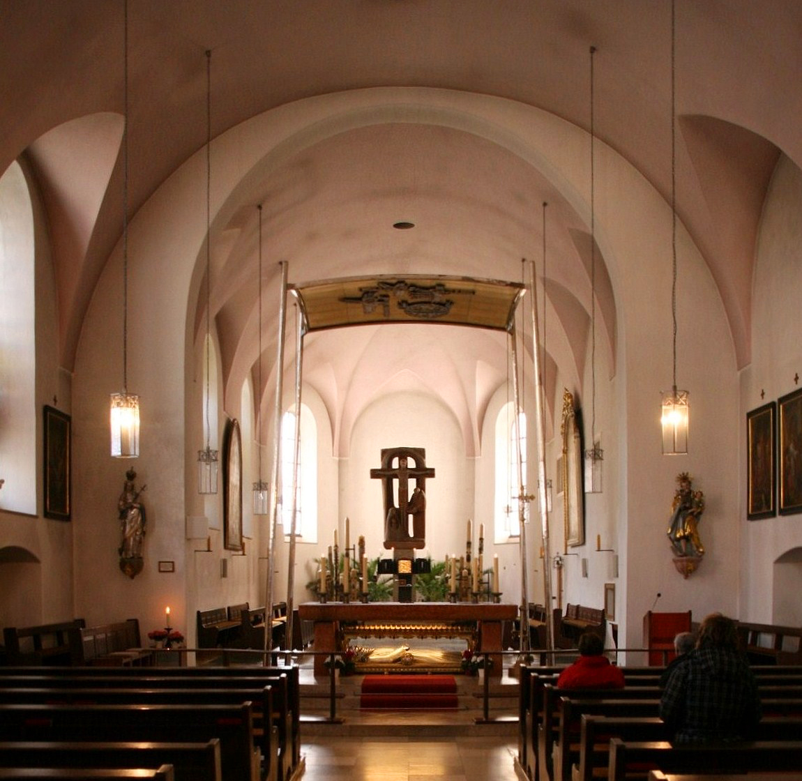 Bruder Konrad-Kirche im Wallfahrtsort Altötting (Landkreis Altötting, Oberbayern). Der Chor des 1657 als St. Anna-Kirche erbauten Gotteshauses.